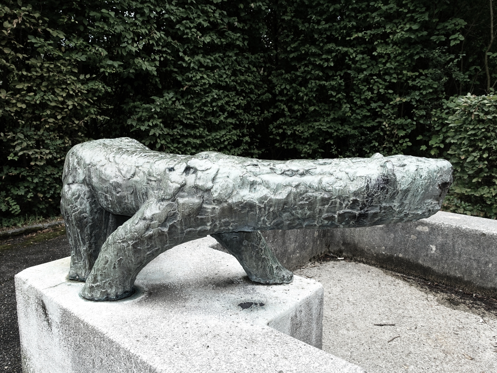 Reinach, Baselland, Turnhalle Egerten, Brunnenskulptur Eisbär, Hans Jakob Meyer (1903-1981) Bildhauer, Zeichner